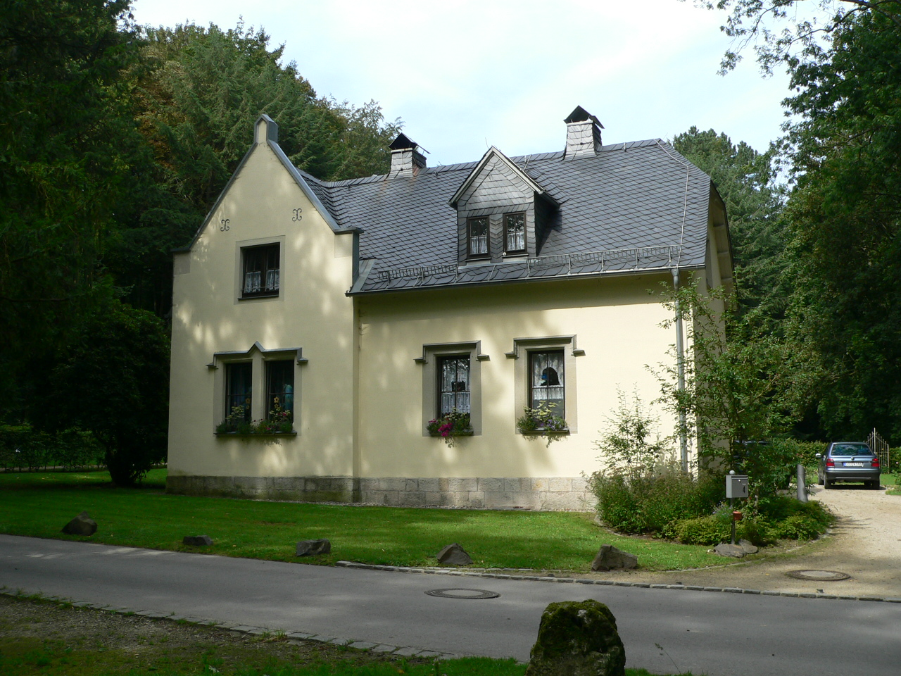 Das Kavaliershaus im Schlosspark Rosenau bei Coburg